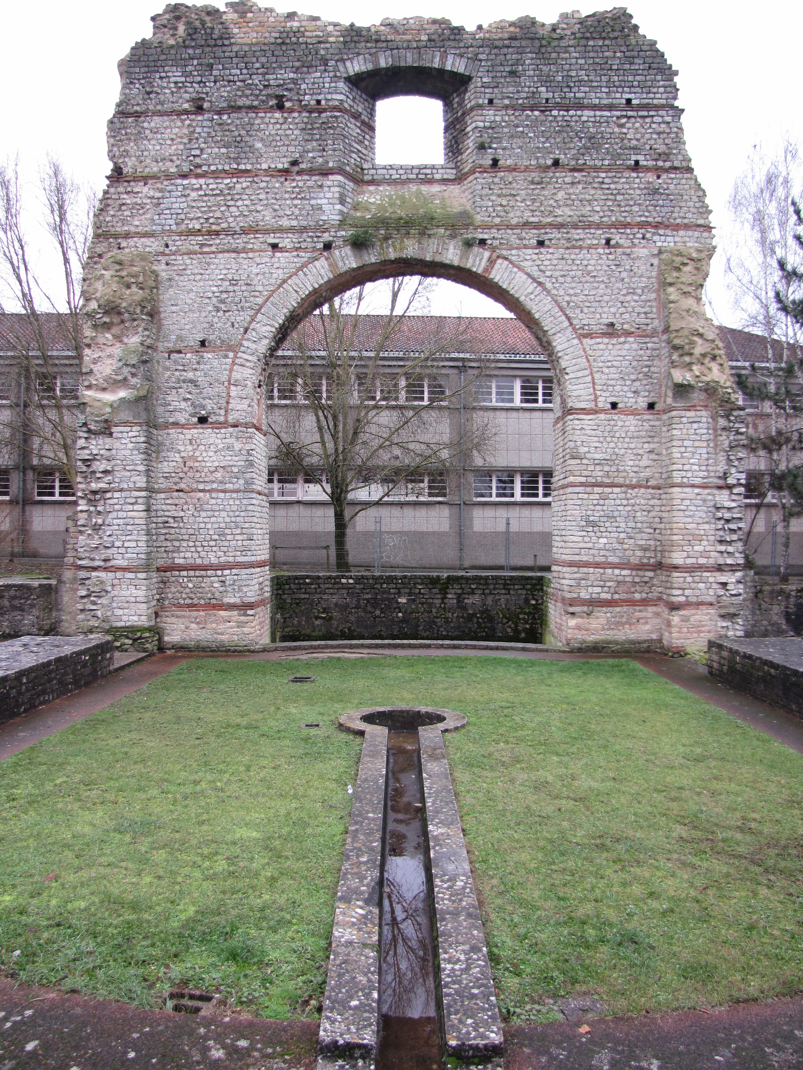 Arc de Diane, Cahors